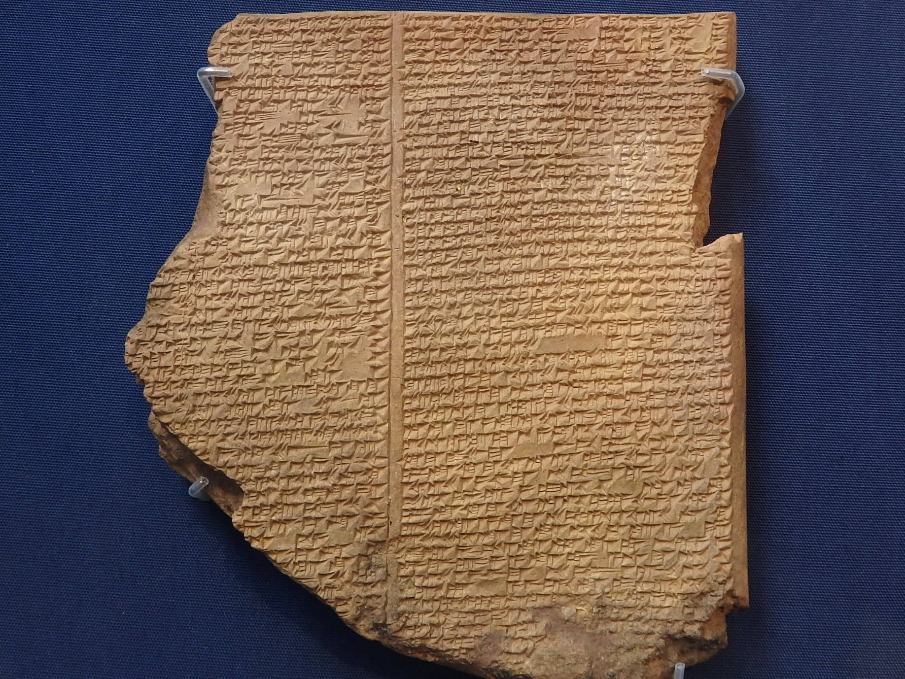 spätassyrische Keilschrifttafel mit Sintflutbericht, British Museum ME K.3375